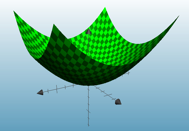 cono parabólico